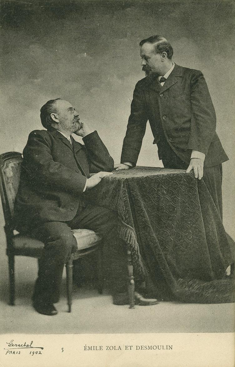 Carte postale, Émile Zola et Fernand Desmoulin. Éditeur Gerschel, photographe inconnu, 1902. Musée de Bretagne, Rennes. Inv. : 980.0051.1039